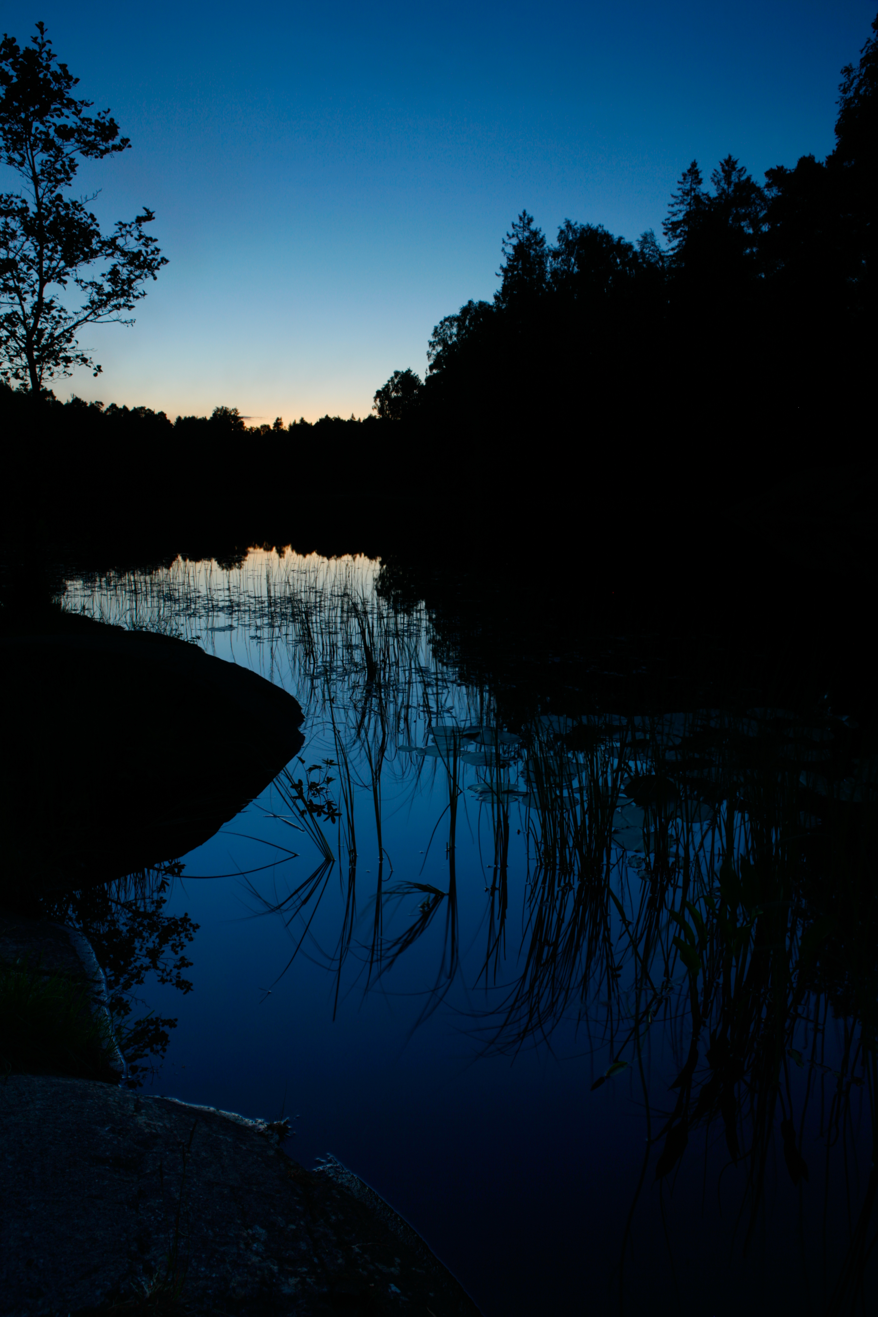 Molbekktjernet fotografert fra sør, mot den blå nattehimmelen. Dette vannet ble anlagt som isdam på 1800-tallet.